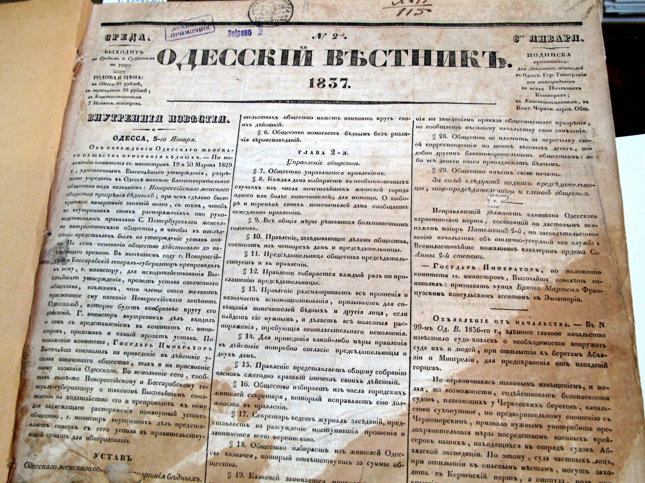 Титульна сторінка газети 1837